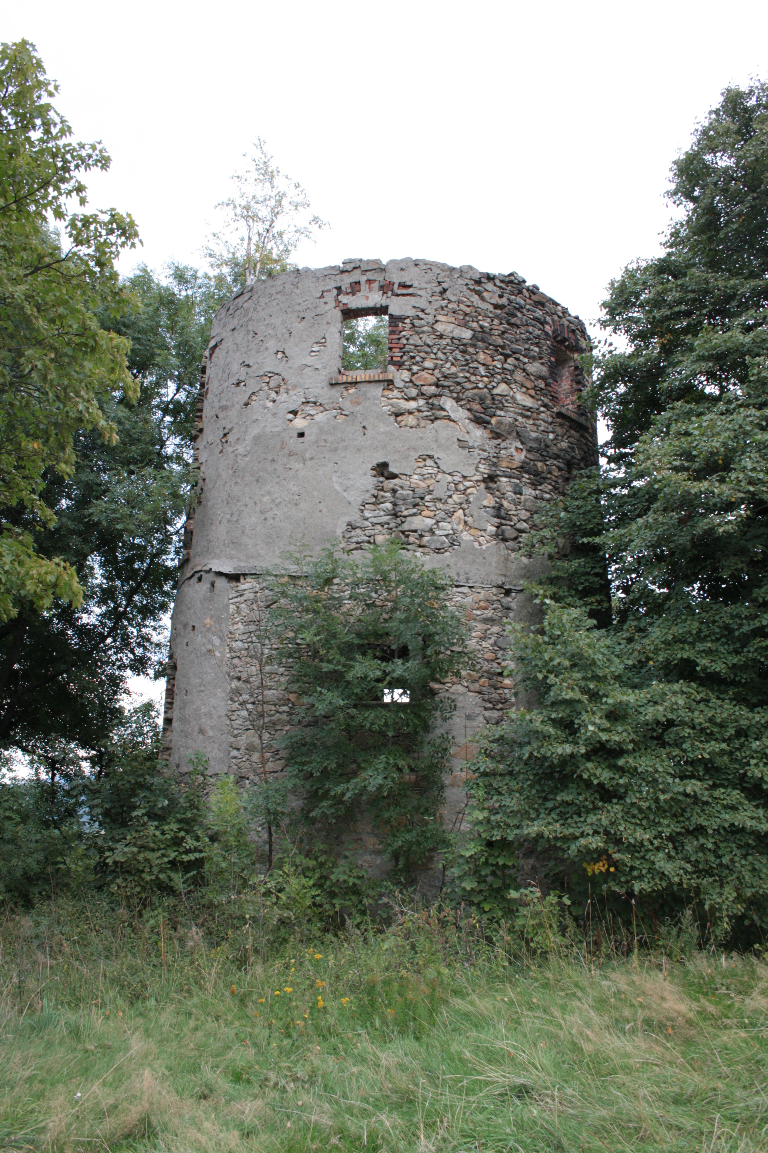 This photograph was taken with a DSLR from WMCZ's Camera grant. Ruiny větrného mlýna na Lysém vrchu u Vysokého, součásti Heřmanic v Libereckém kraji.